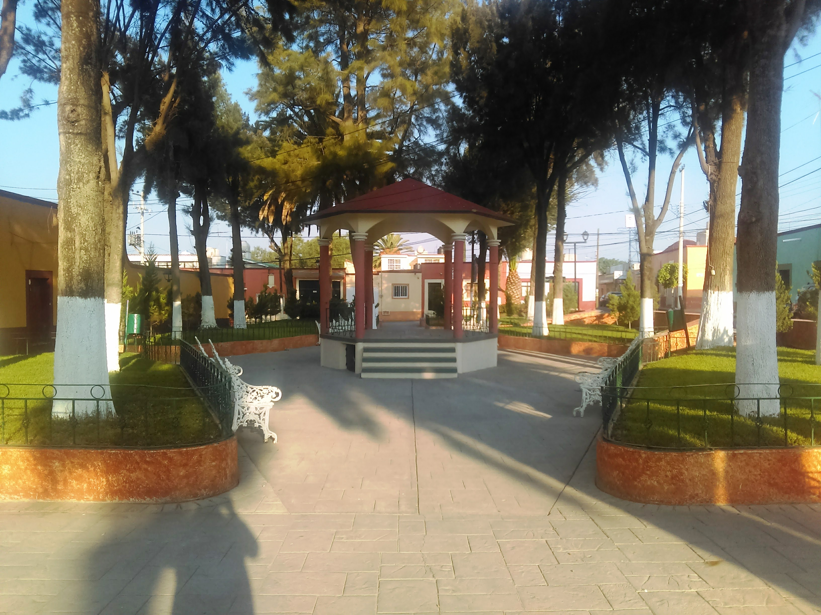 Jardín Nicolás Romero "El Salto" en Actopan, Hidalgo